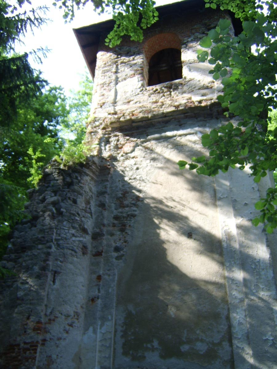 Der Kirchturm der St. Niklauskirche in Elsenau (Schäffern)